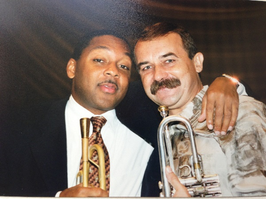 Владимир Пушкарев и Уинтон Марсалис